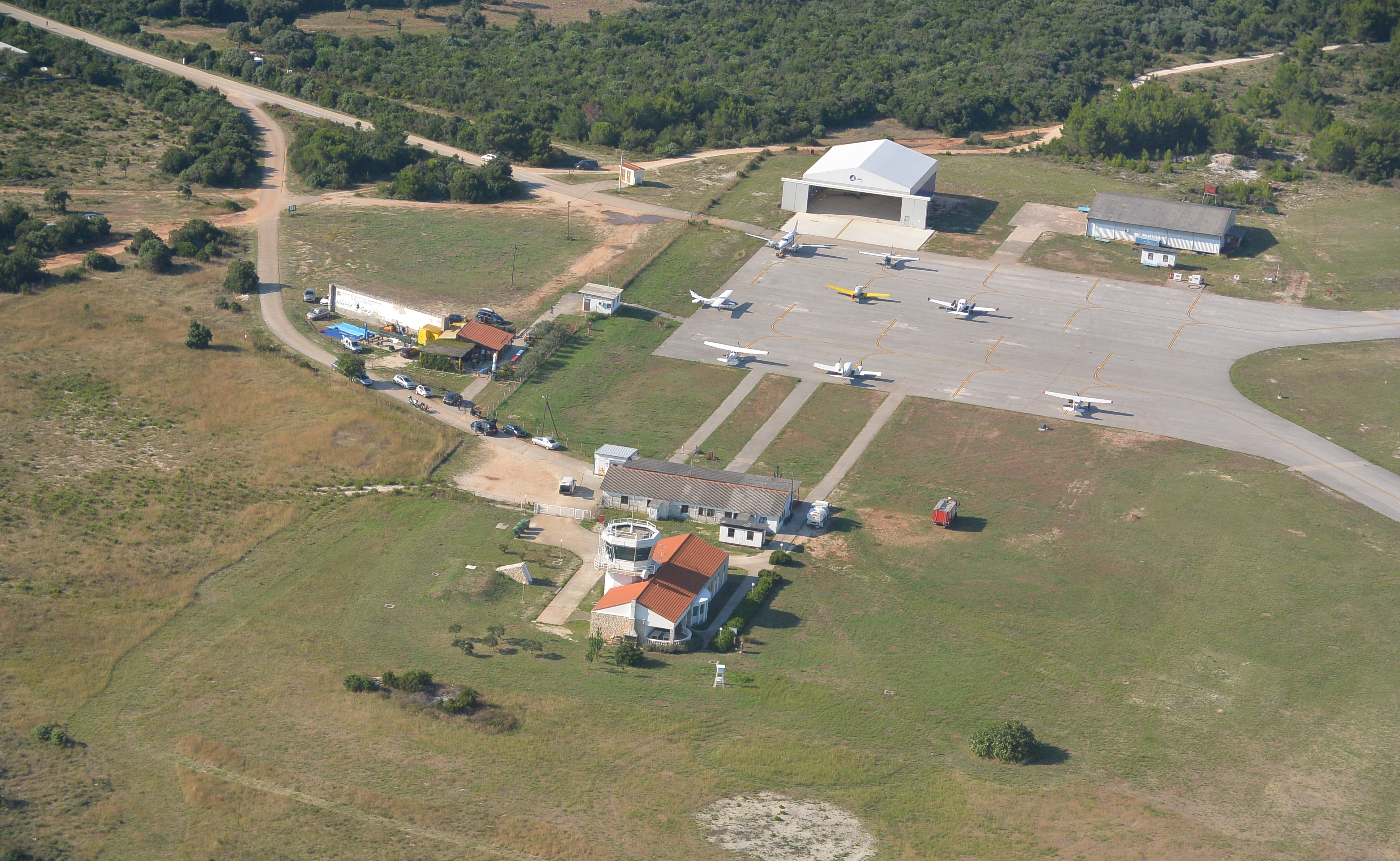 Luftfoto Losinj Airport 2014